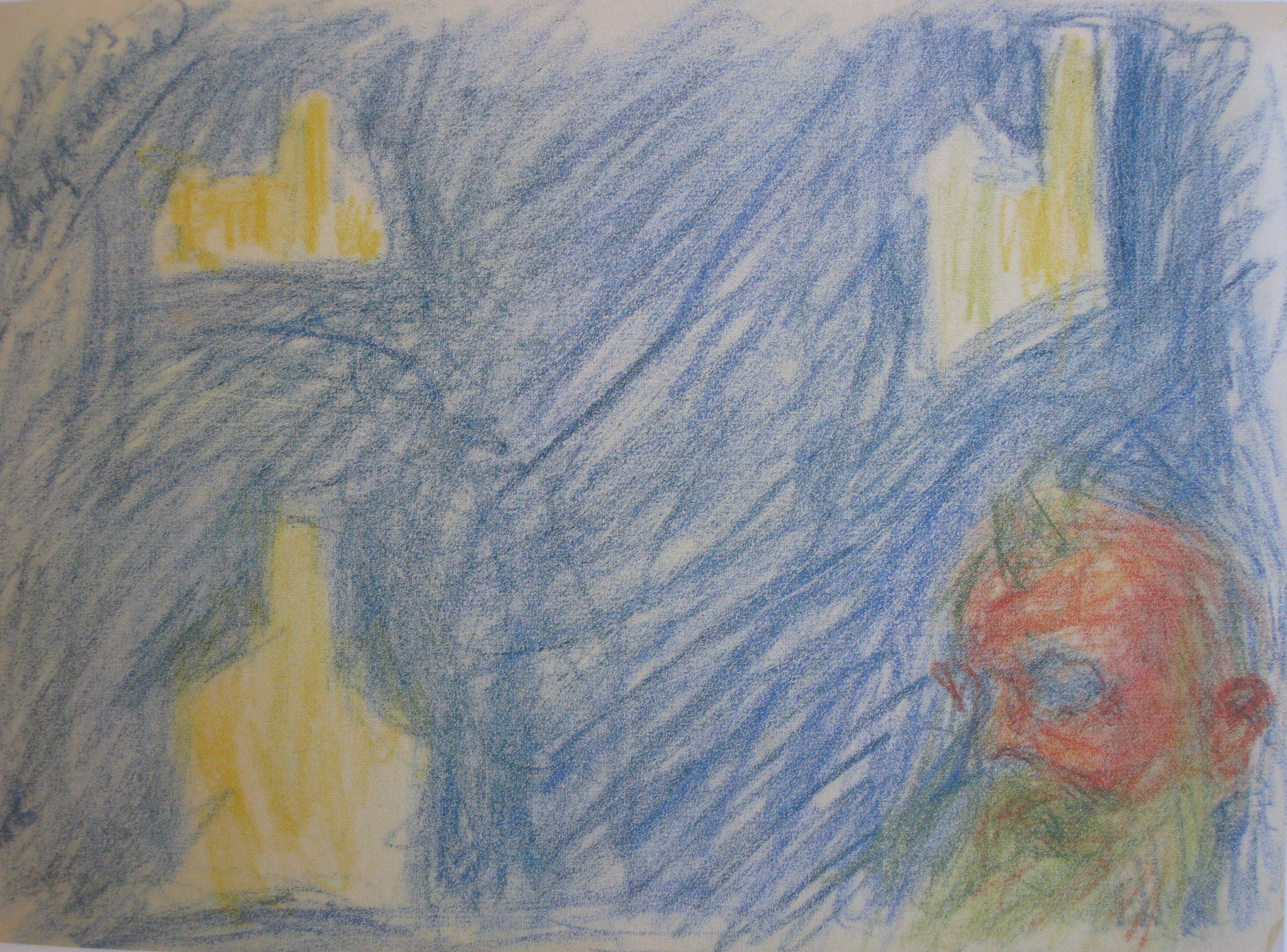 1932, Farbstift auf Papier